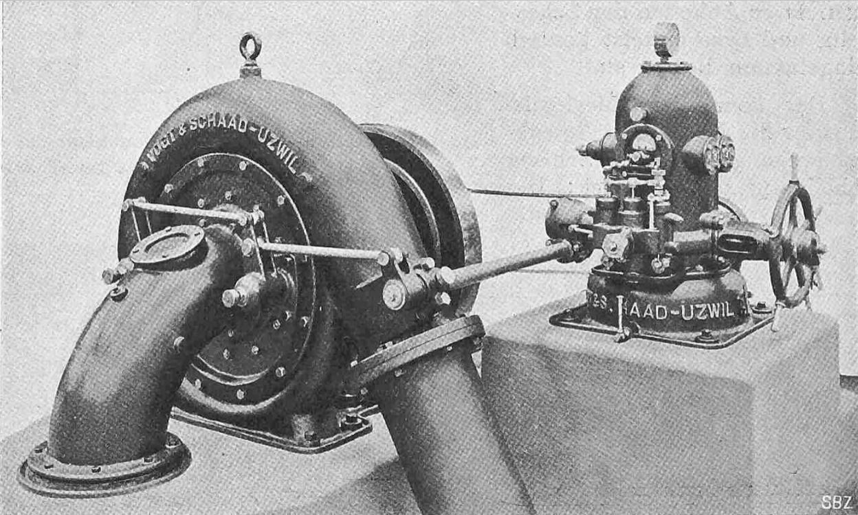 Francis-Turbine der Firma Vogt & Schaad (vormals Benninger & Co.) Uzwil SG, Schweiz an der Schweizerischen Landesausstellung 1914 in Bern: Spiral-Francisturbine mit automatischer und Handregulierung, 150 PS bei 50 Meter Gefälle und 1100 Uml/min.